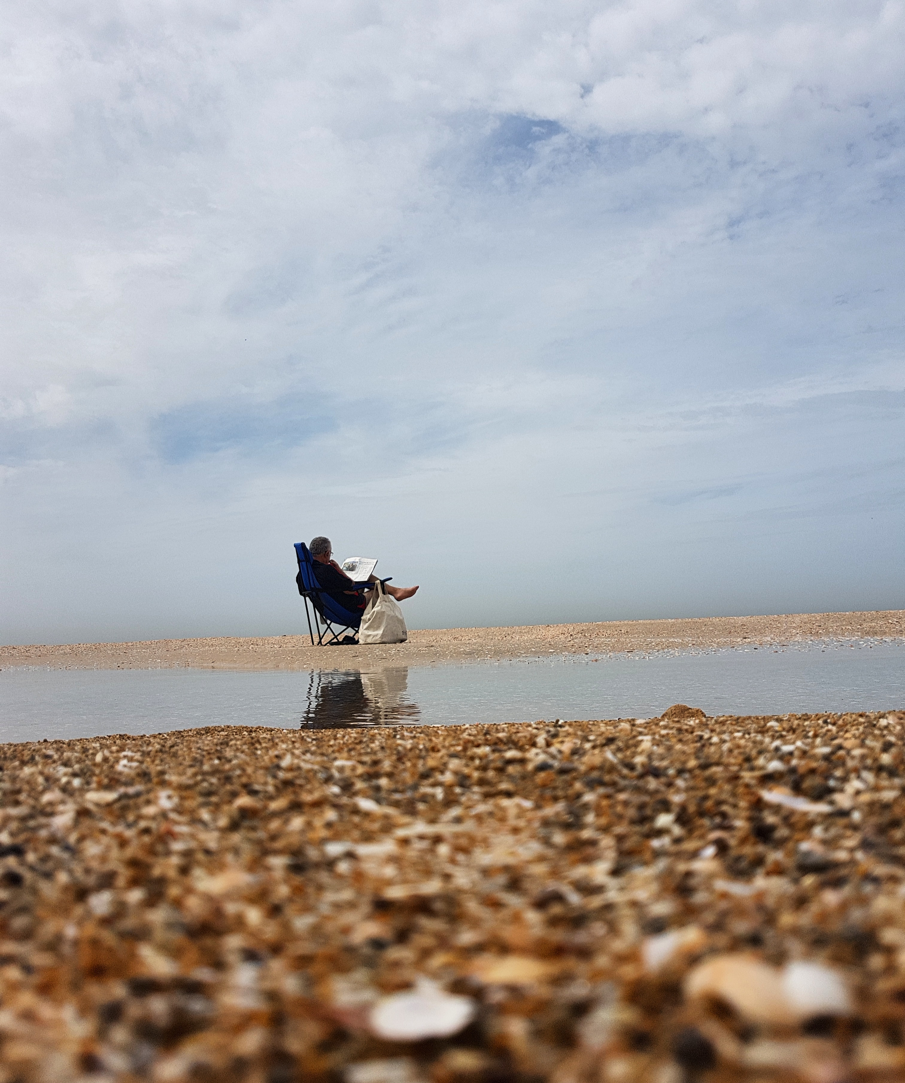 חוף פלמחים הוא חוף ים השוכן במישור החוף הדרומי, מדרום לראשון לציון ולנחל שורק, ליד קיבוץ פלמחים. אזור החוף הוכרז כגן לאומי.